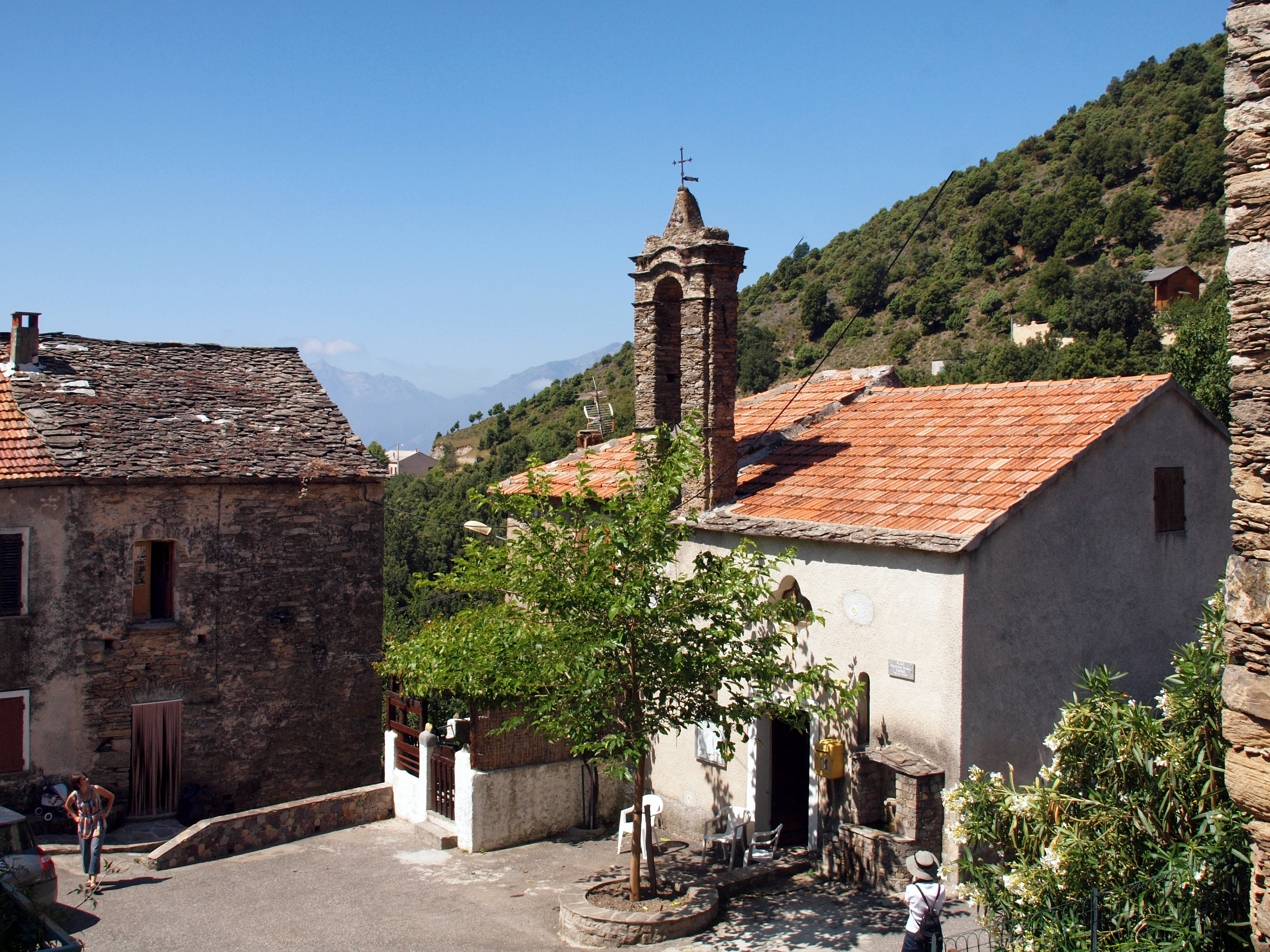 Bustanico, Bozio (Haute-Corse) - Chapelle Saint-Vincent à Soprano. Elle s'appelait autrefois chapelle de l'Annonciation dite Annunziata. Elle pourrait dater du VIIe siècle. Le clocher a été rajouté au XVIIIe siècle.